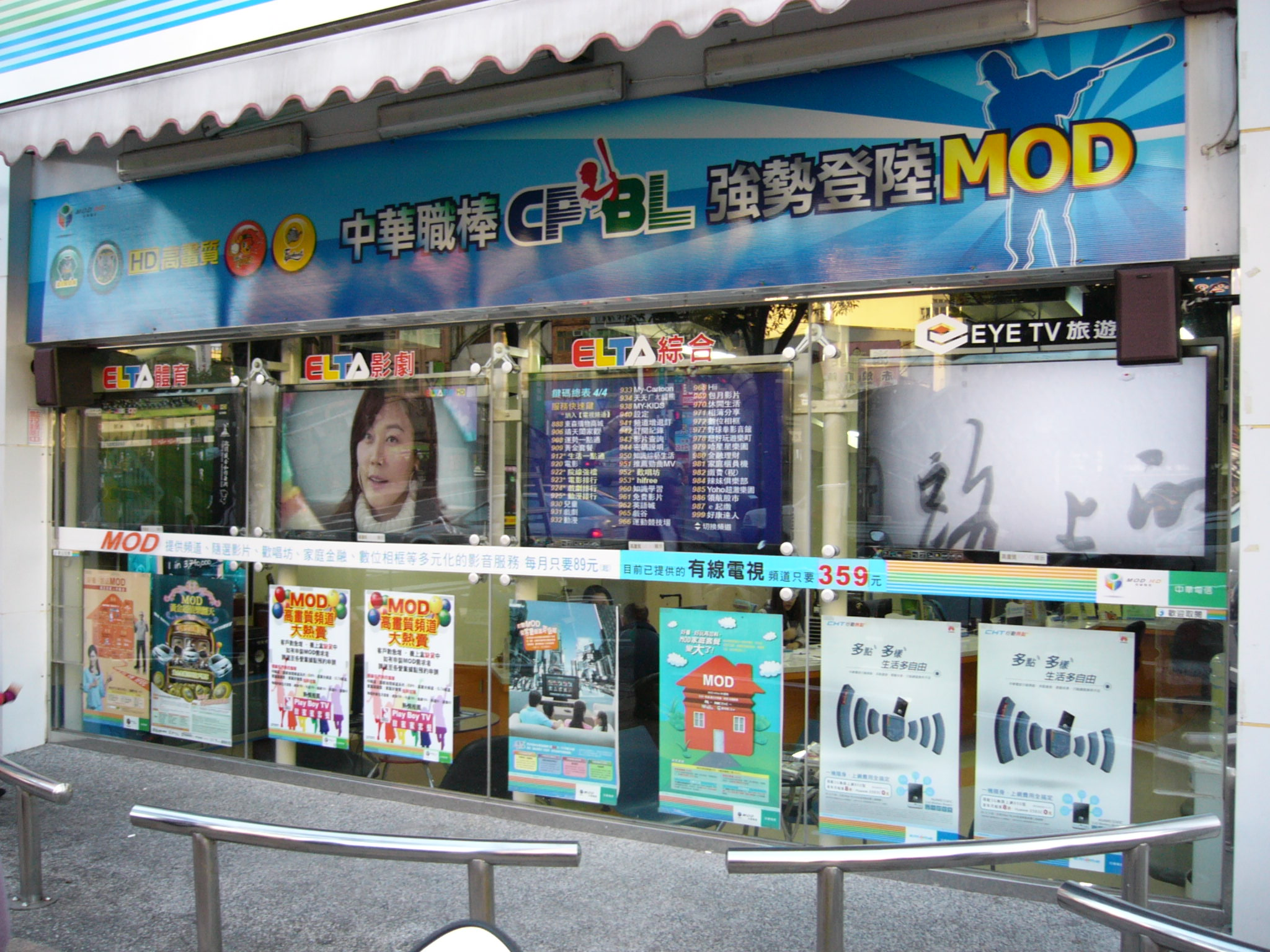 中文（台灣）: 中華電信基隆服務中心（基隆市仁愛區仁一路321號1樓）玻璃窗展示中華電信MOD。